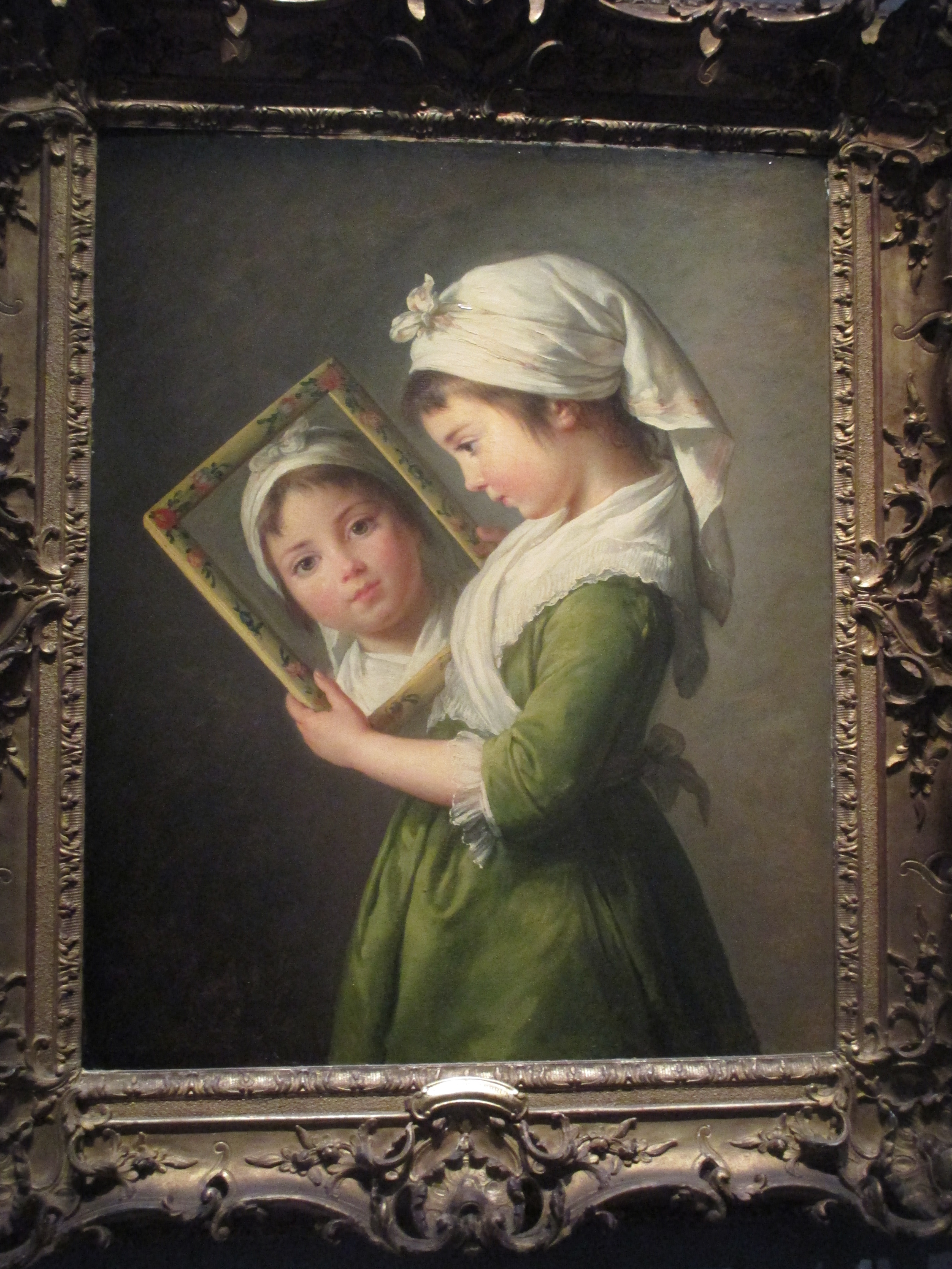 Portrait de sa fille Julie par Mme Vigée Le Brun (1787). Collection David-Weill.